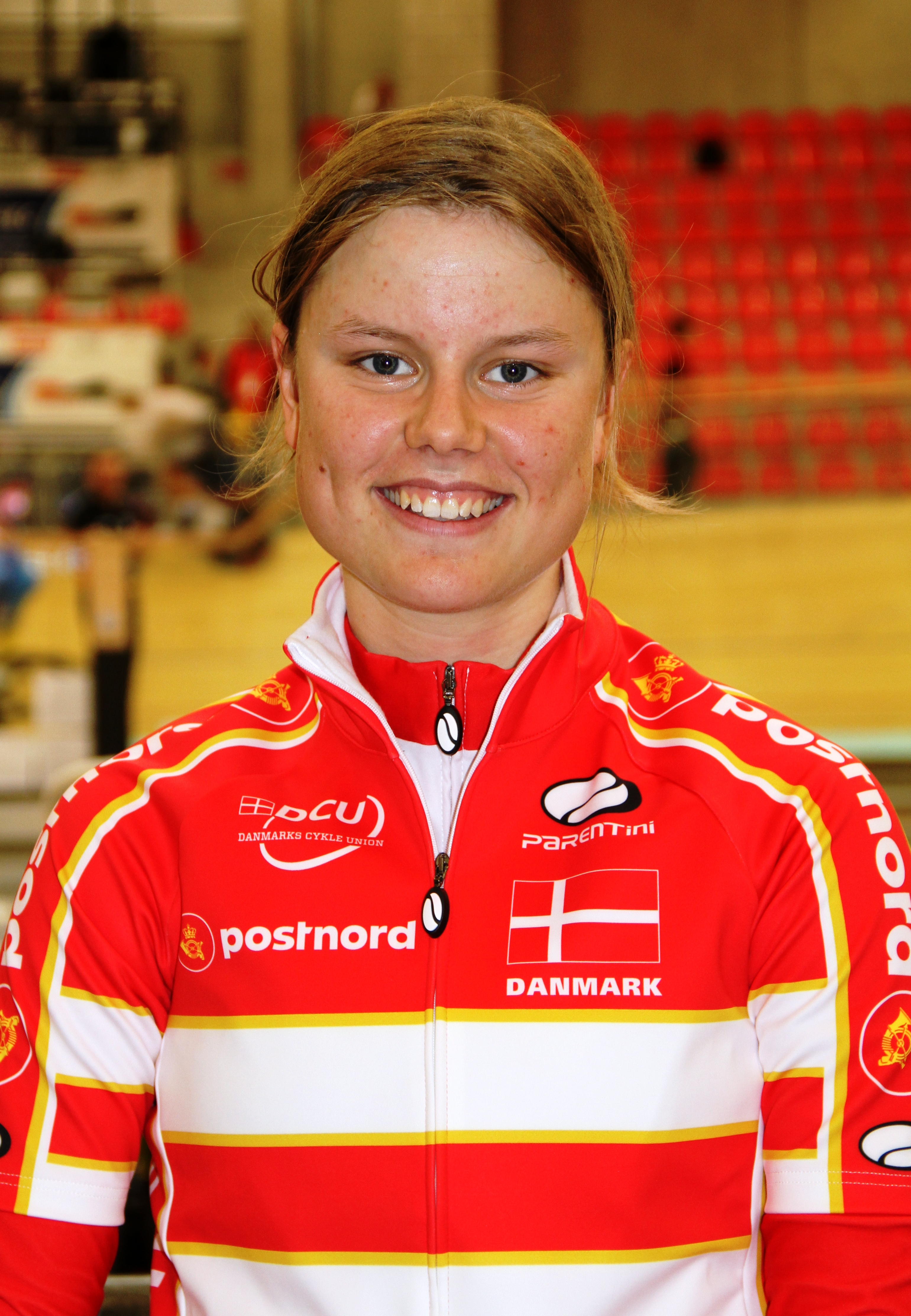 Amalie Dideriksen, dänische Radsportlerin The making of this document was supported by the Community-Budget of Wikimedia Germany.